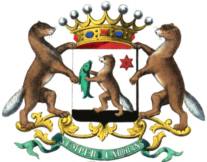 Armoiries de la famille de Biber